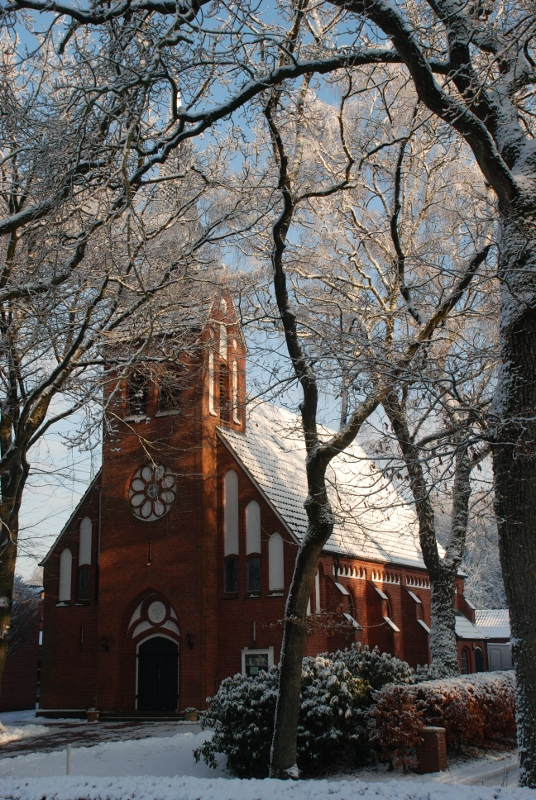 Kirche In Ihlowerfehn, Ostfriesland